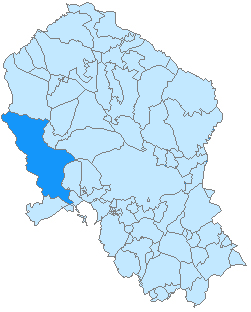 Mapa de Hornachuelos en la provincia de Córdoba, Andalucía, España.